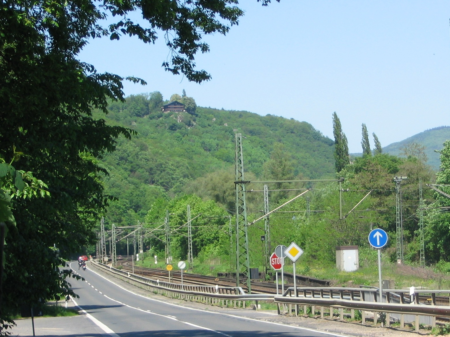 Das Schweizerhaus am Rhein, oberhalb von Burg Rheinstein. Blick aus Richtung Bingen